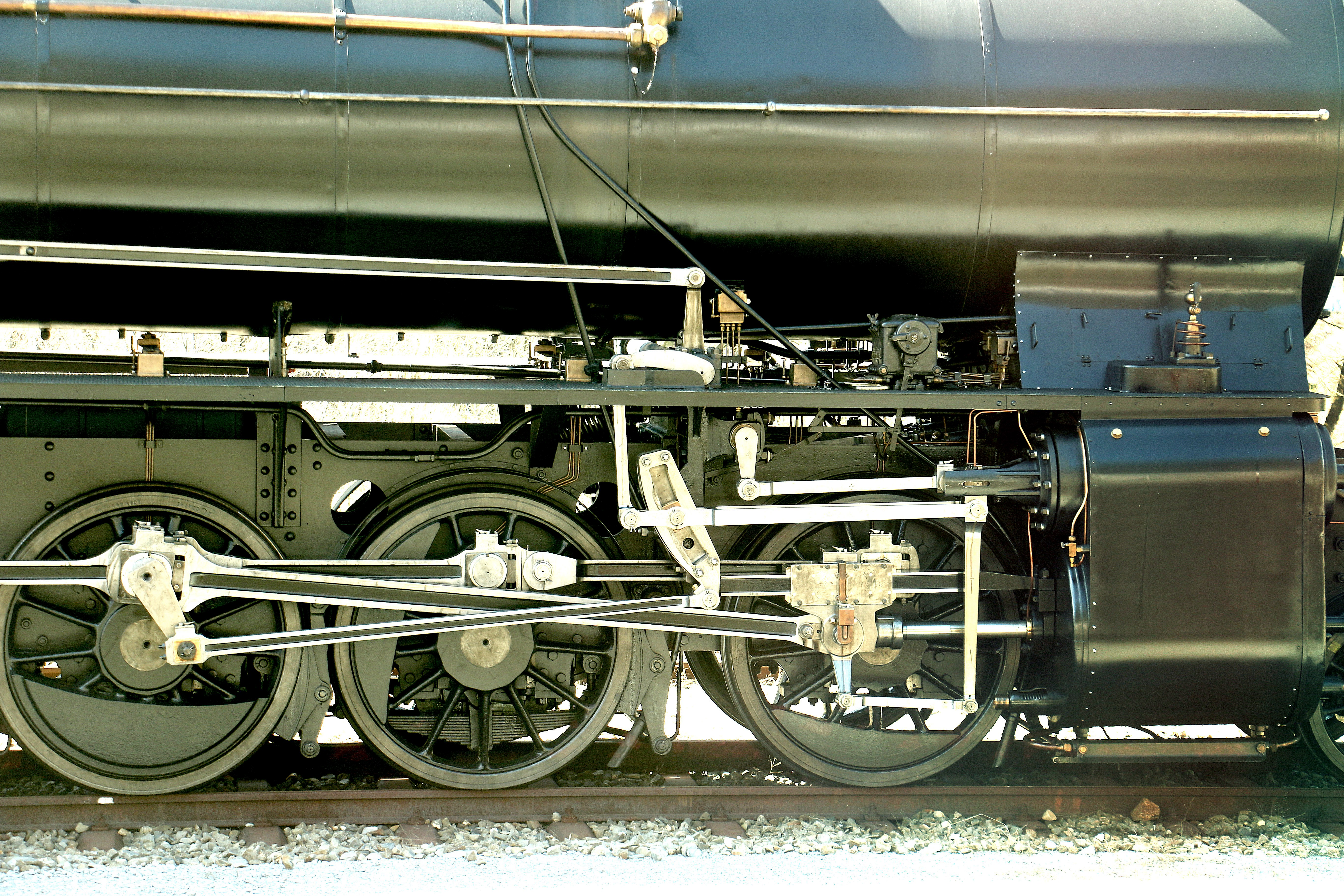 Dampflokomotive 2969 Alfred Escher Detail (2018)